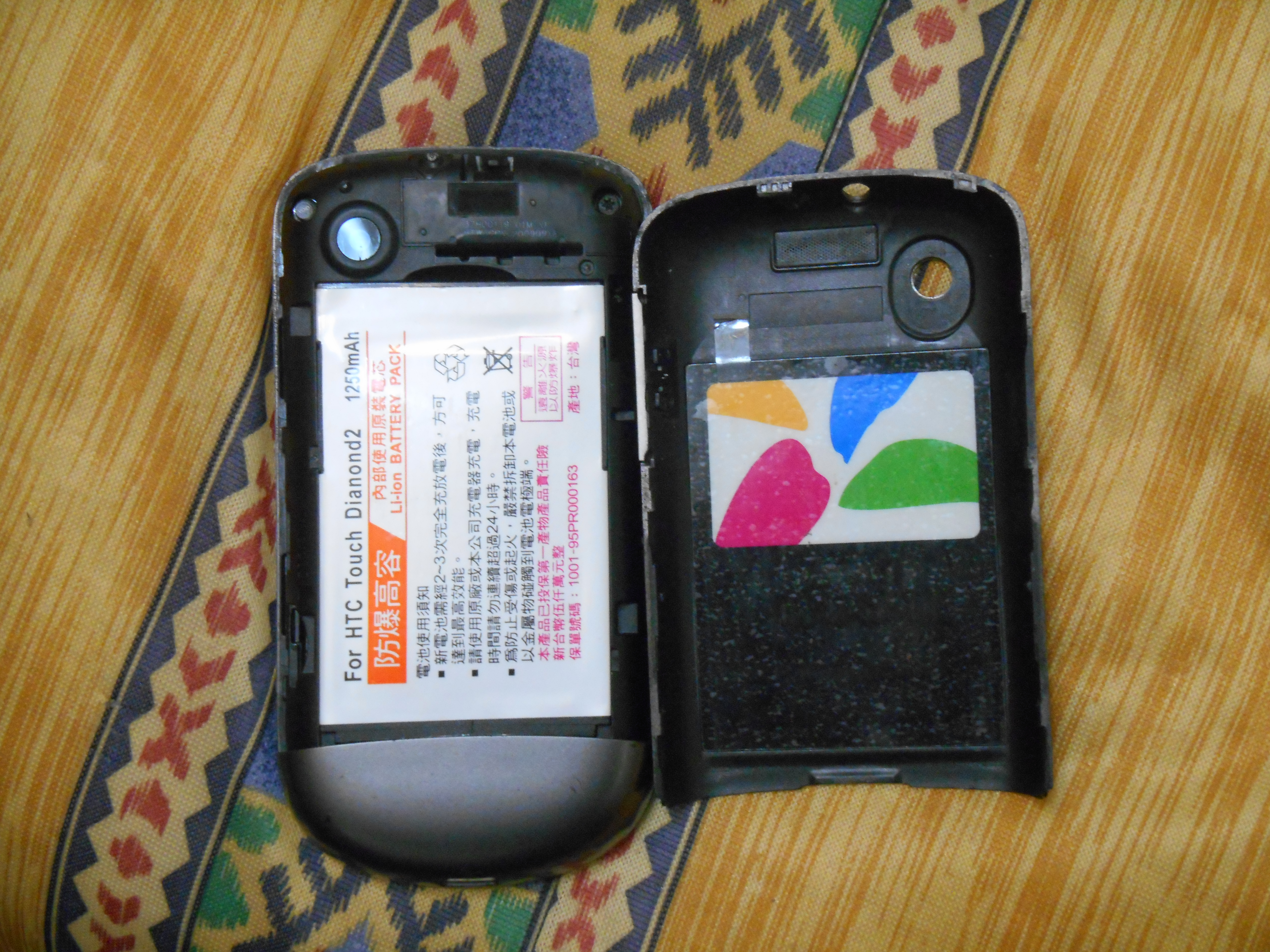 Htc Tattoo 的背面印上悠遊卡貼紙。為悠遊卡公司與HTC的第一次合作。世界第一台可以自訂手機背殼機。